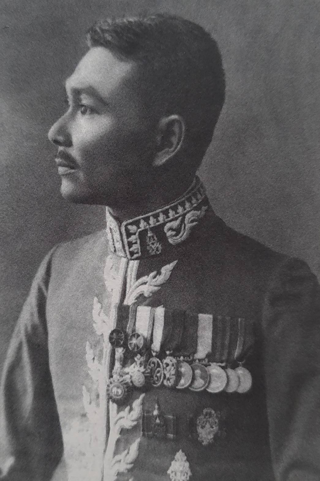 พระยาอภิรักษ์ราชอุทยาน (ทิตย์ ณ สงขลา) เมื่อครั้งเป็นพระยาพฤกษาภิรมย์ (อายุ 34 ปี)